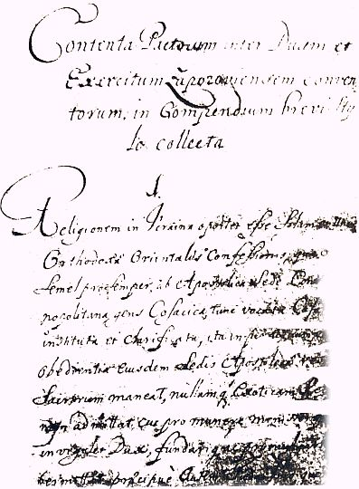 Перша Конституція України Пилипа Орлика. 1710 рік.